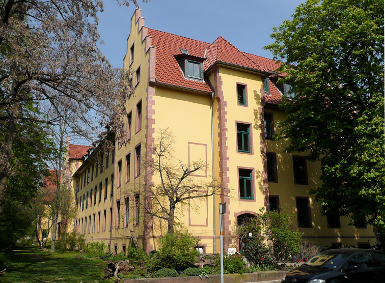 Schwesternstrasse 10 in Hannover